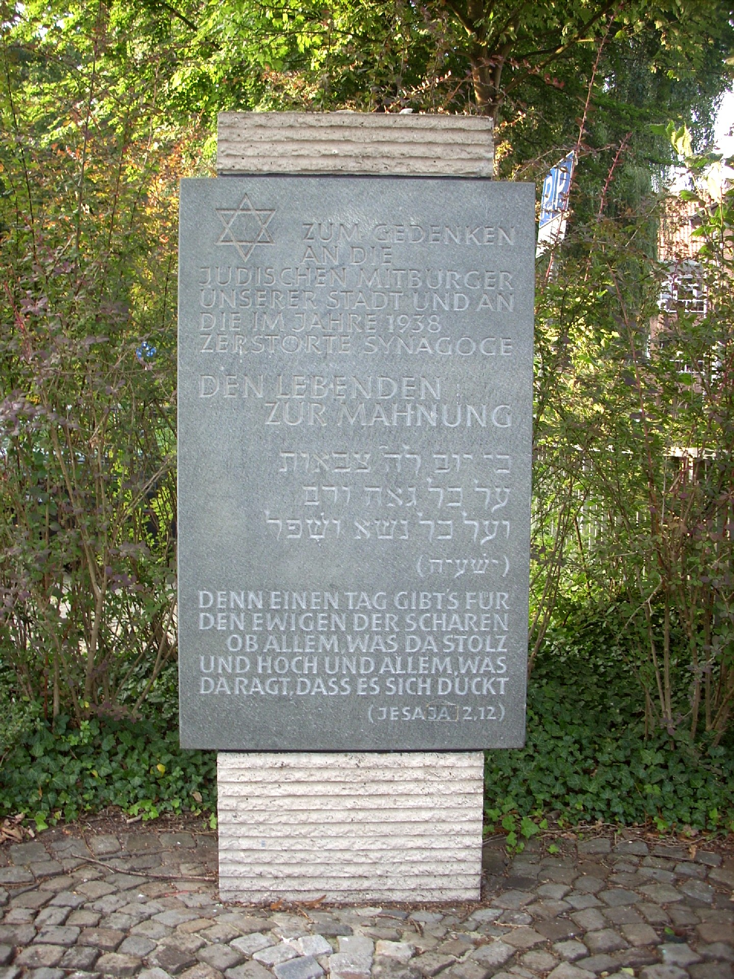 Synagogenmahnmal, Nordhorn